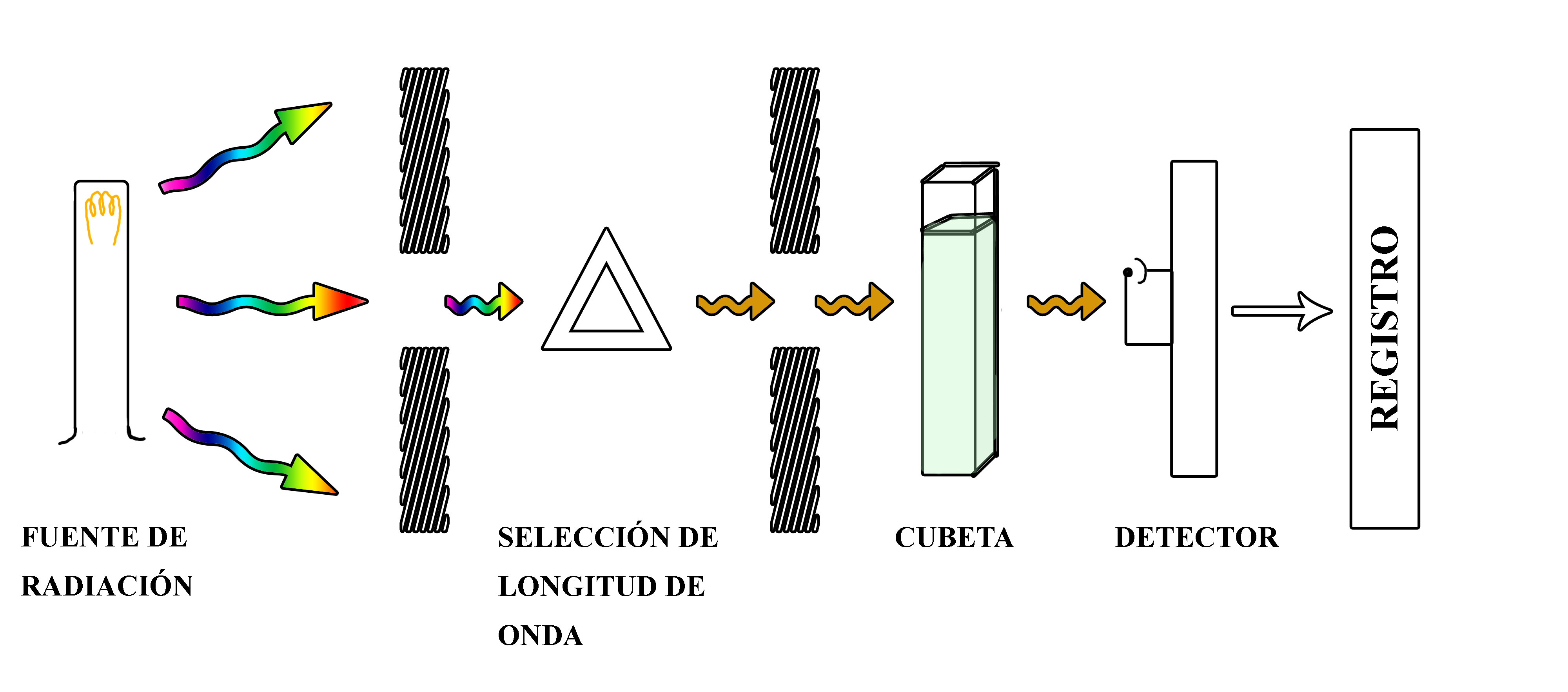 Componentes básicos de un equipo de espectrometria